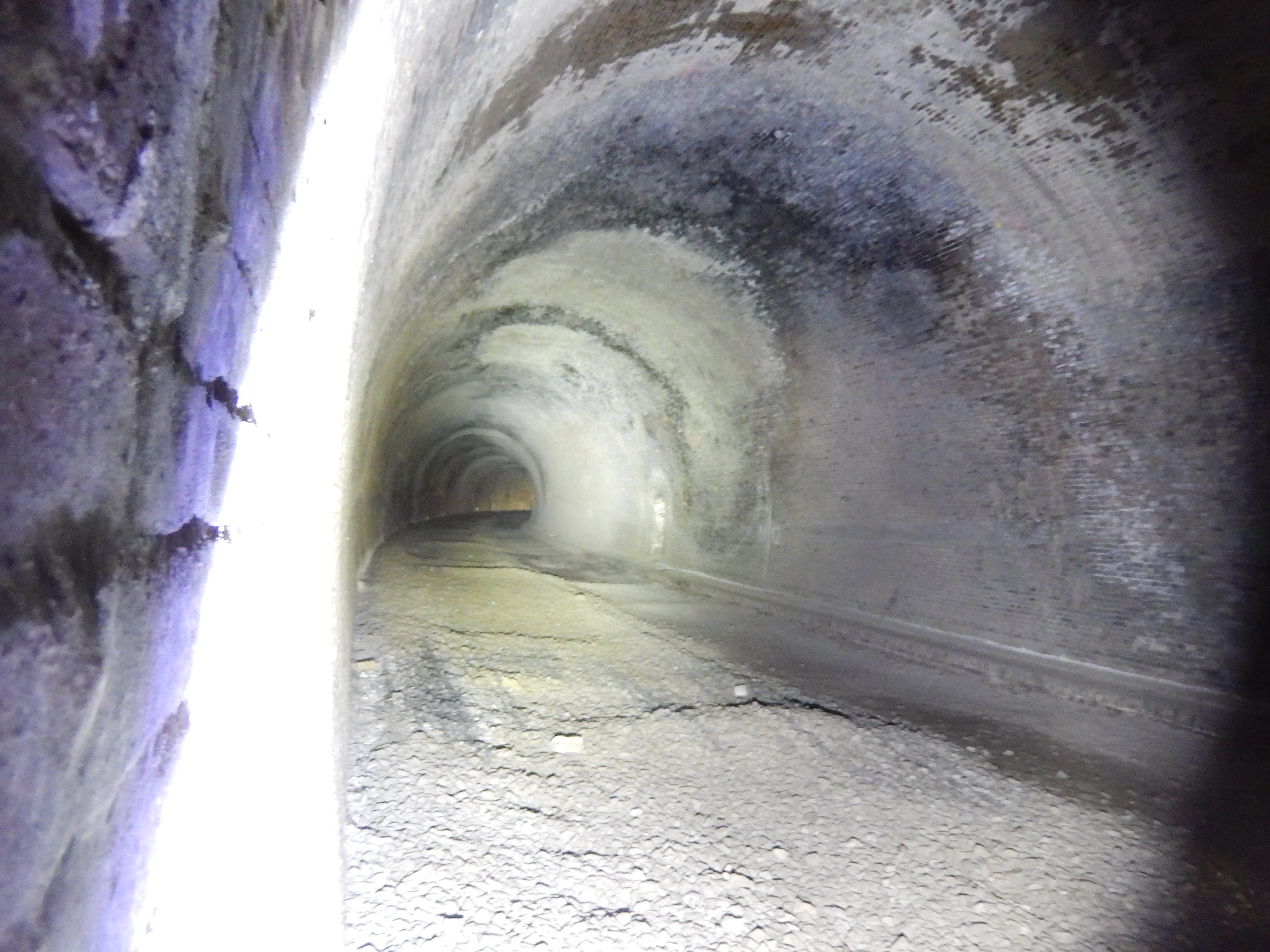 Volkmarshäuser Tunnel, mit Taschenlampe angestrahlt